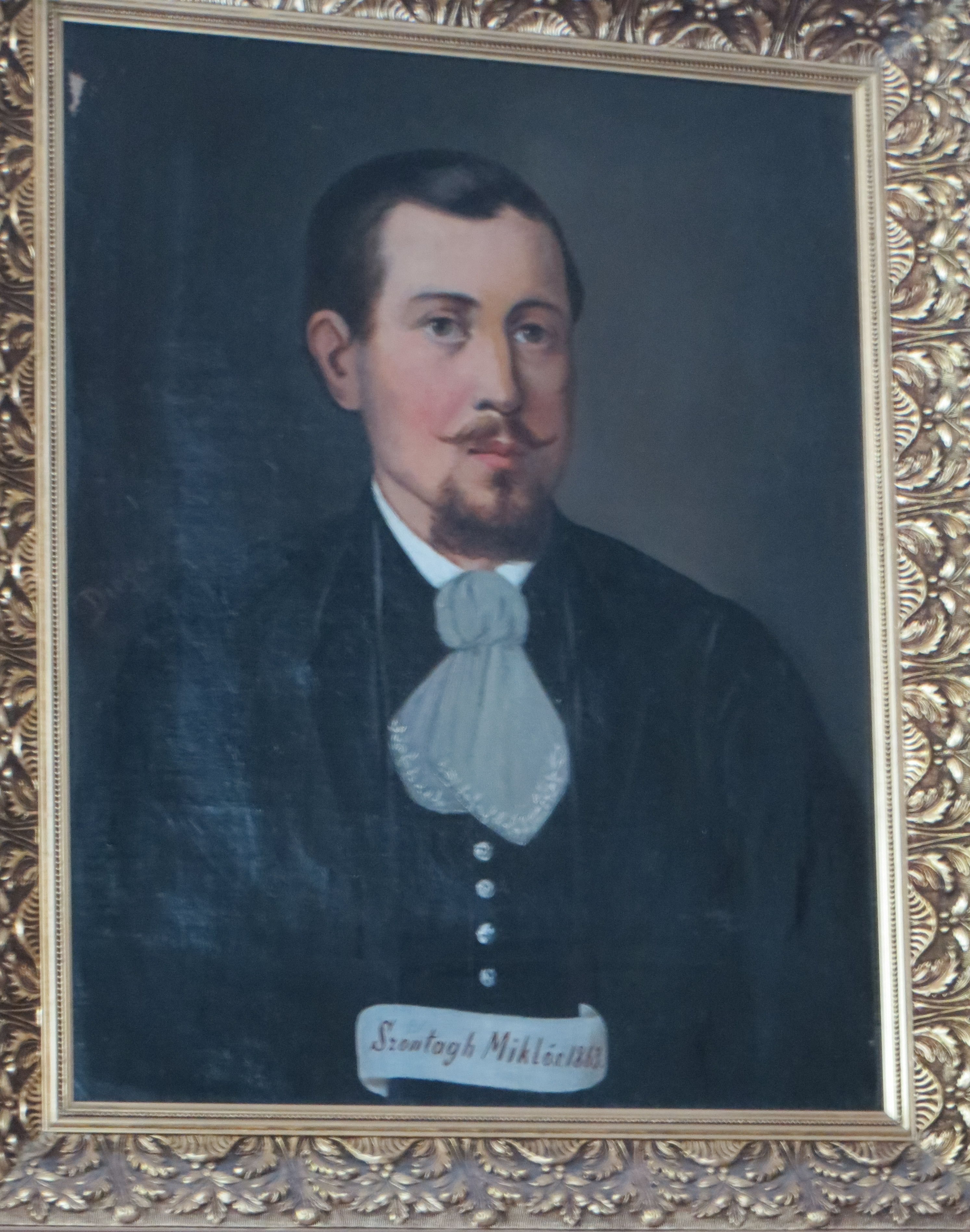 Dr. Szontagh Miklós képe az újtátrafüredi Dr. Szontagh villában